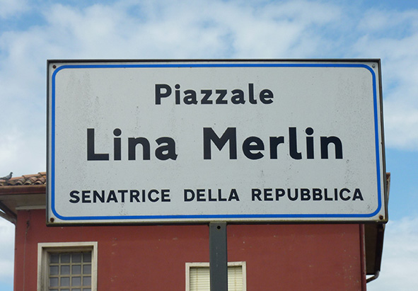 Foto di Maria Pia Ercolini per Toponomastica femminile